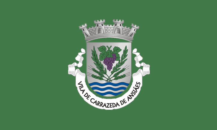 Bandera del muncipio.